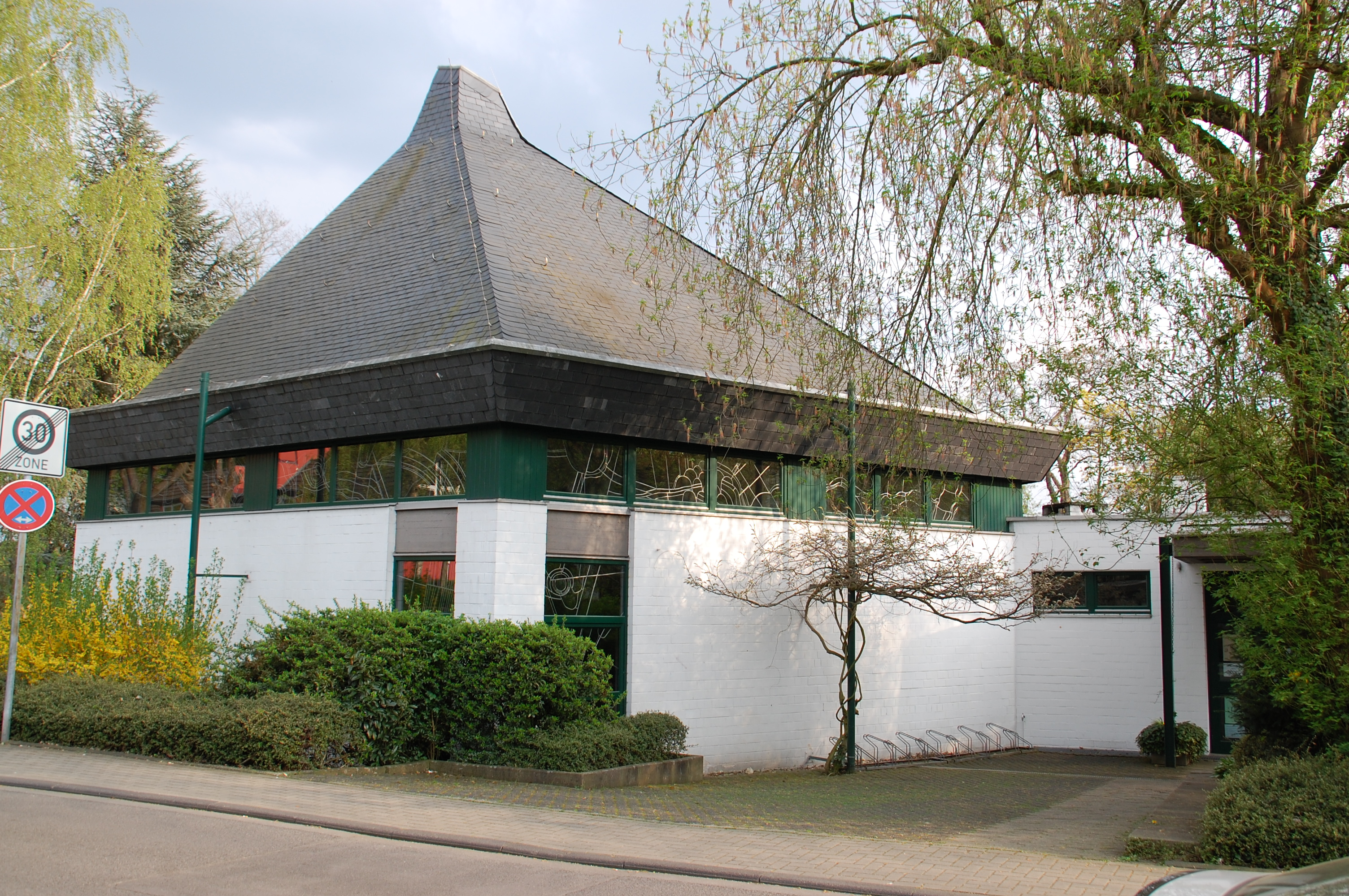 Dietrich-Bonhoeffer-Kirche Lindenthal, Cologne, Germany